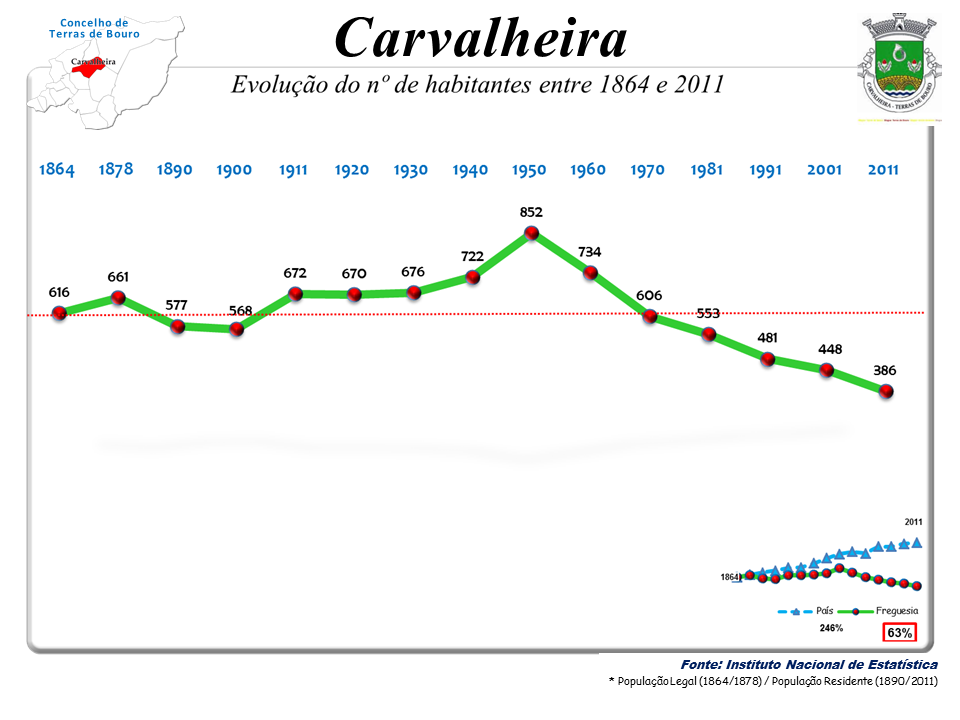 Censos 1864/2011